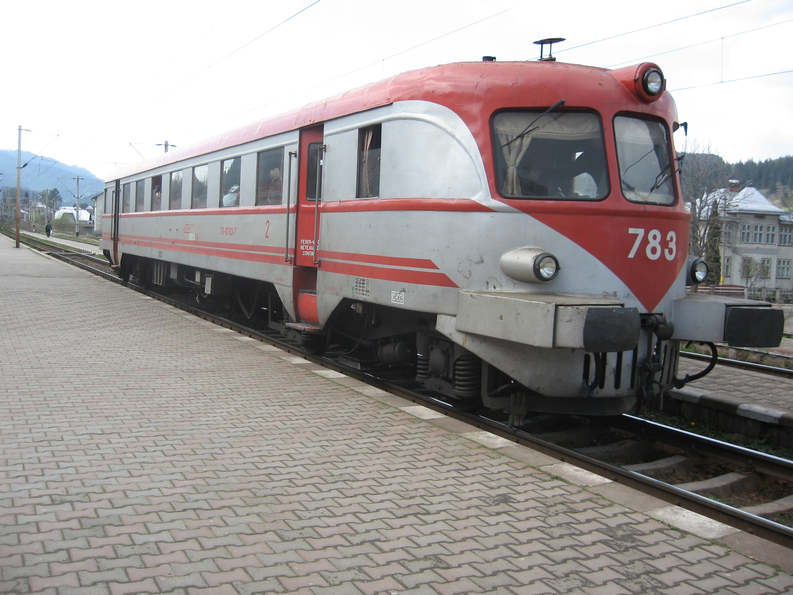 Automotor Clasa 78-750